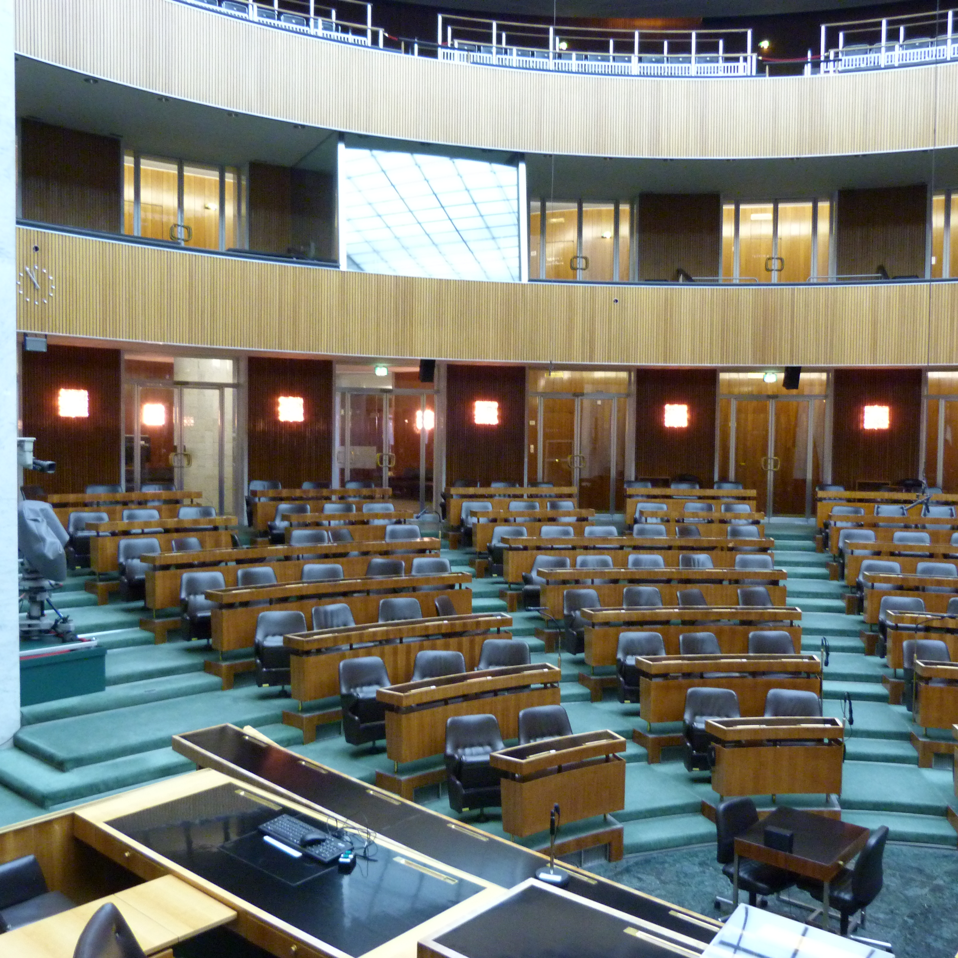 A felvétel 2014. december 3-án, szerdán készült. Bécs, Ausztria. Parlament. ©© Derzsi Elekes Andor, Budapest, 2014, A kép egészben, vagy részletekben másolását, bármilyen úton történő sokszorosítását és felhasználását a szerző ellenérték nélkül, jogutódjaira is kihatóan megengedi. Az engedély kiterjed a kereskedelmi célú hasznosításra is. Kéri azonban nevének feltüntetését a felhasználás során. A Metapolisz sorozat valamennyi képe és filmje Creative Commons alatti valamint kereskedelmi - for profit - célra is felhasználható. Ajánlott hivatkozás: Derzsi Elekes Andor: Metapolisz DVD line